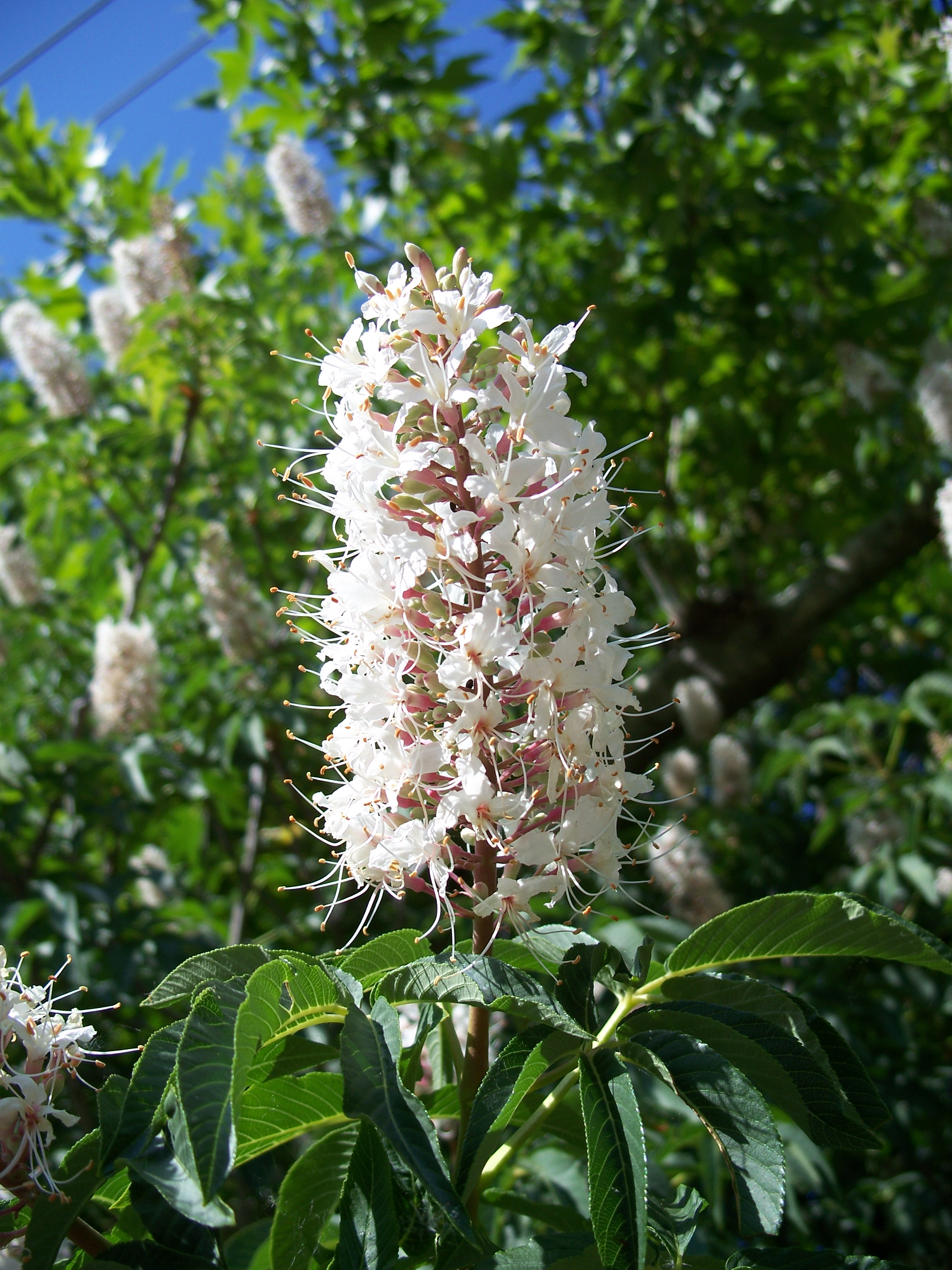 Aesculus californica Made in San Jose, California. Identified by Franz Xaver.